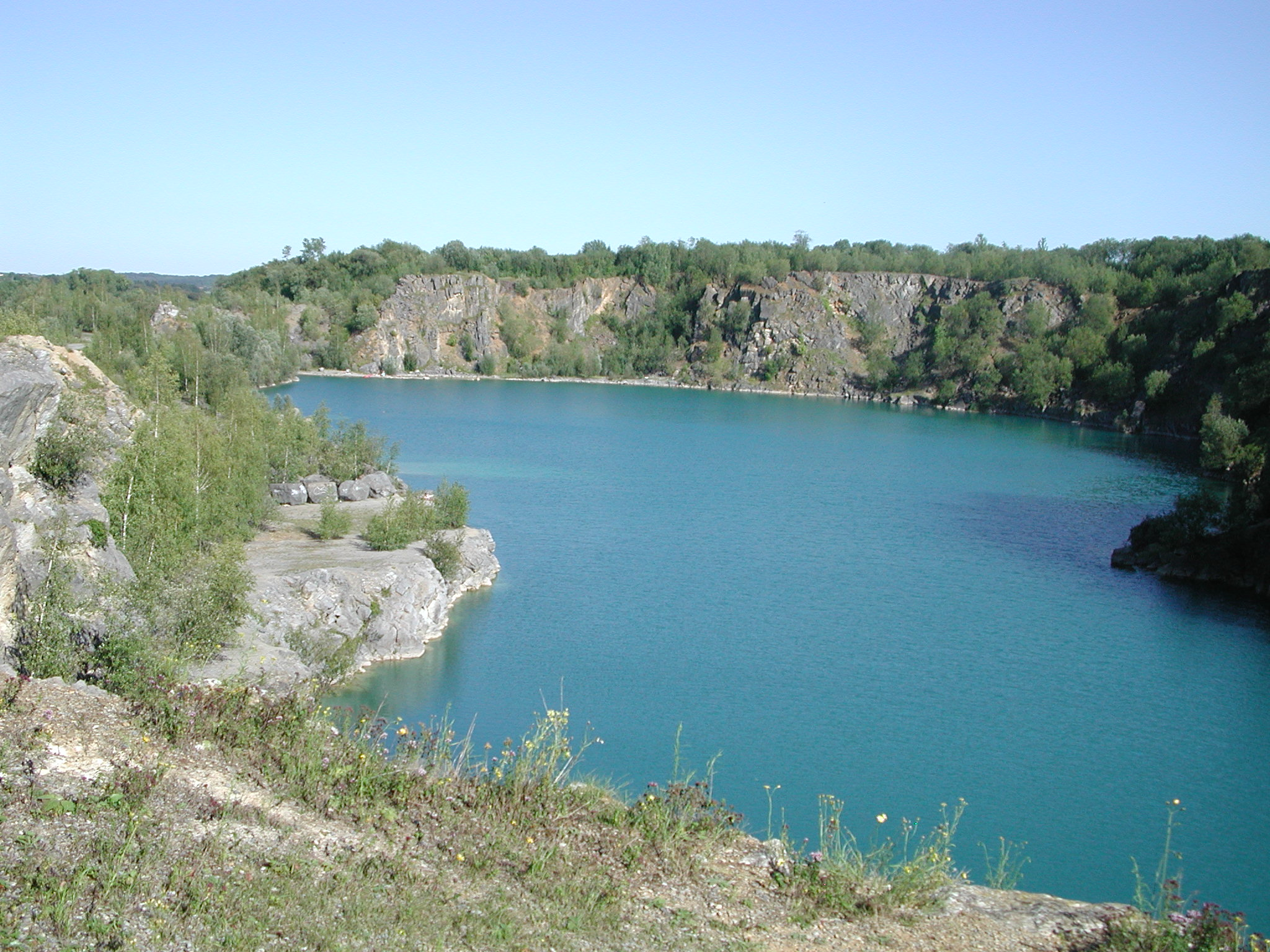 Carrière de Gourdinne vu du haut, lieu magnifique Cette carrière à été inondée d'eau.